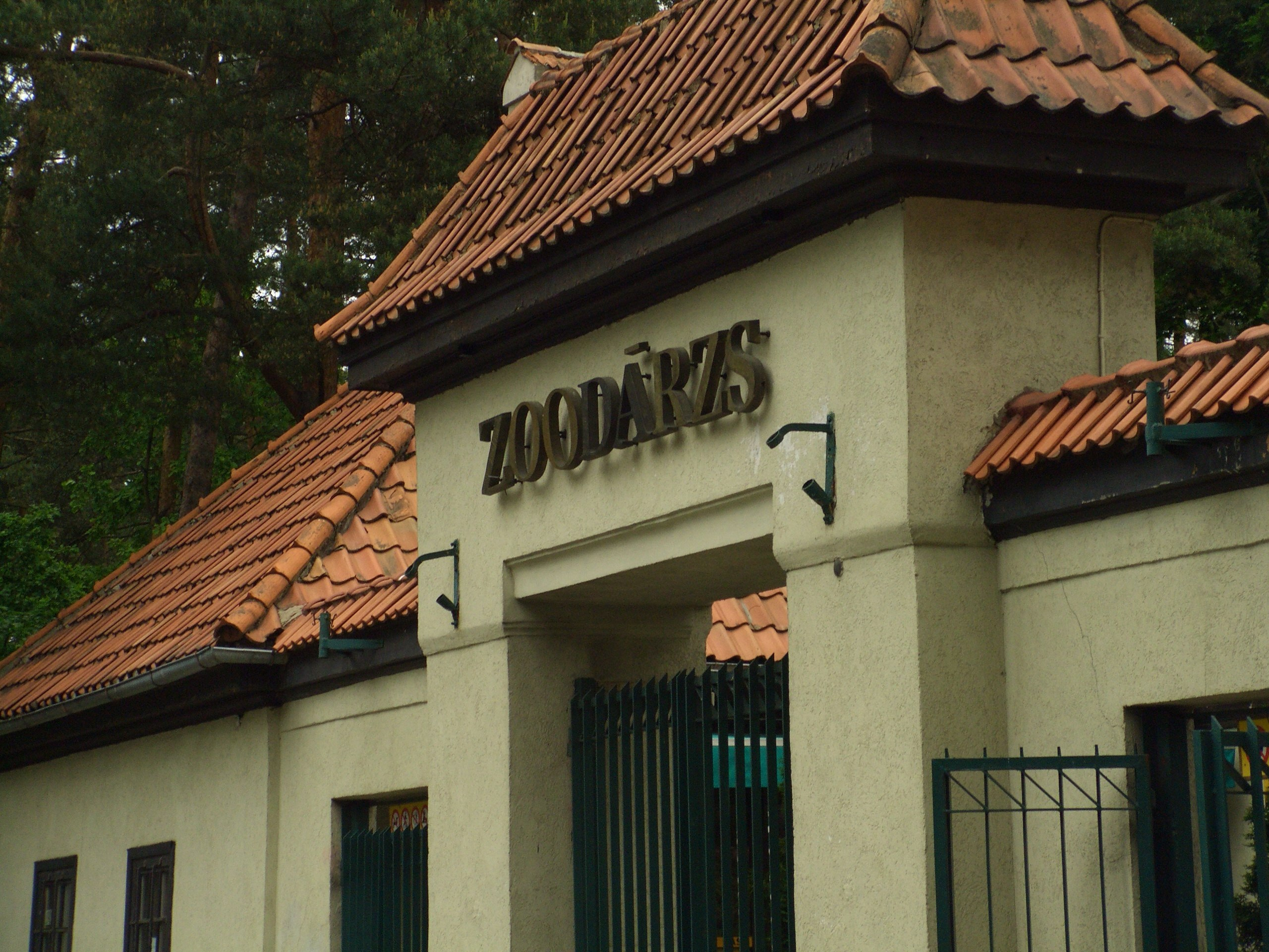 Riga Zoo